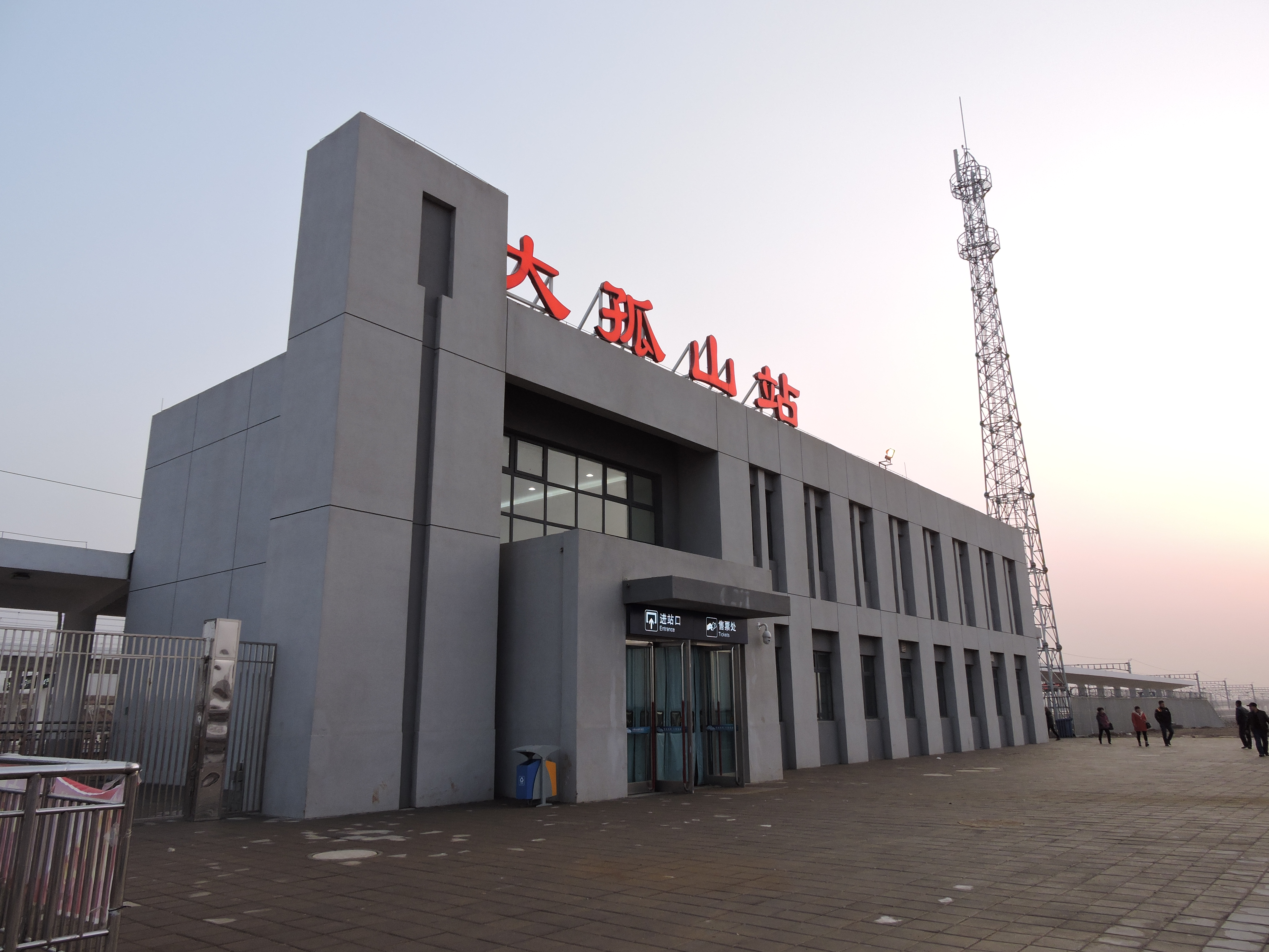 丹大快速铁路大孤山站